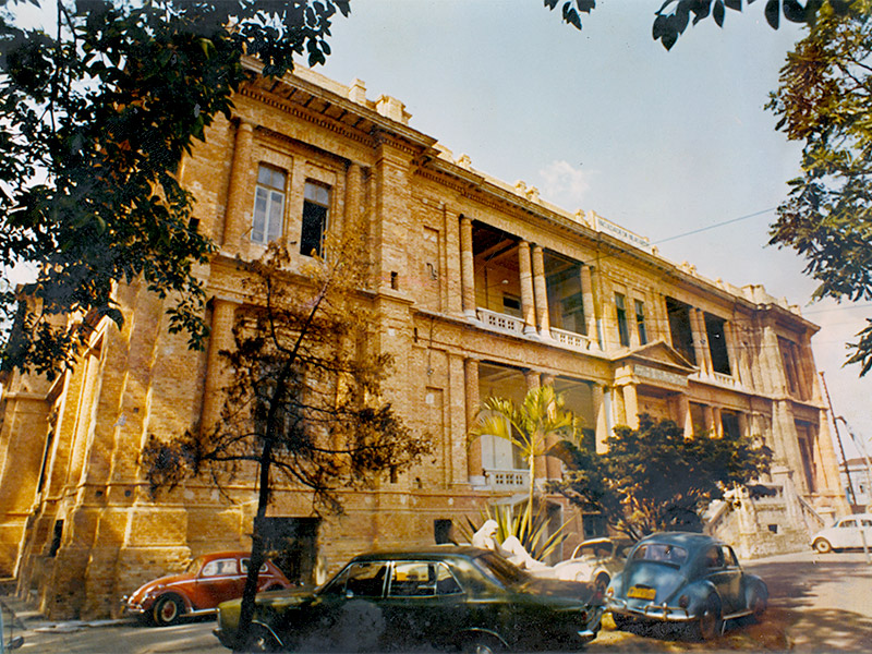 Escola de Belas Artes e assumiu o acervo da Pinacoteca: a partir de 1944, as duas instituições dividiram o prédio na Praça da Luz.